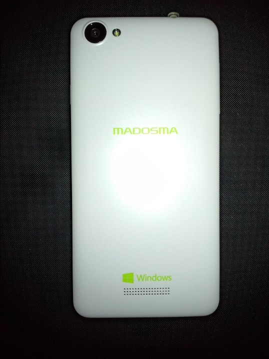 マウスコンピューター製スマートフォンの背面カバー側から見た画像